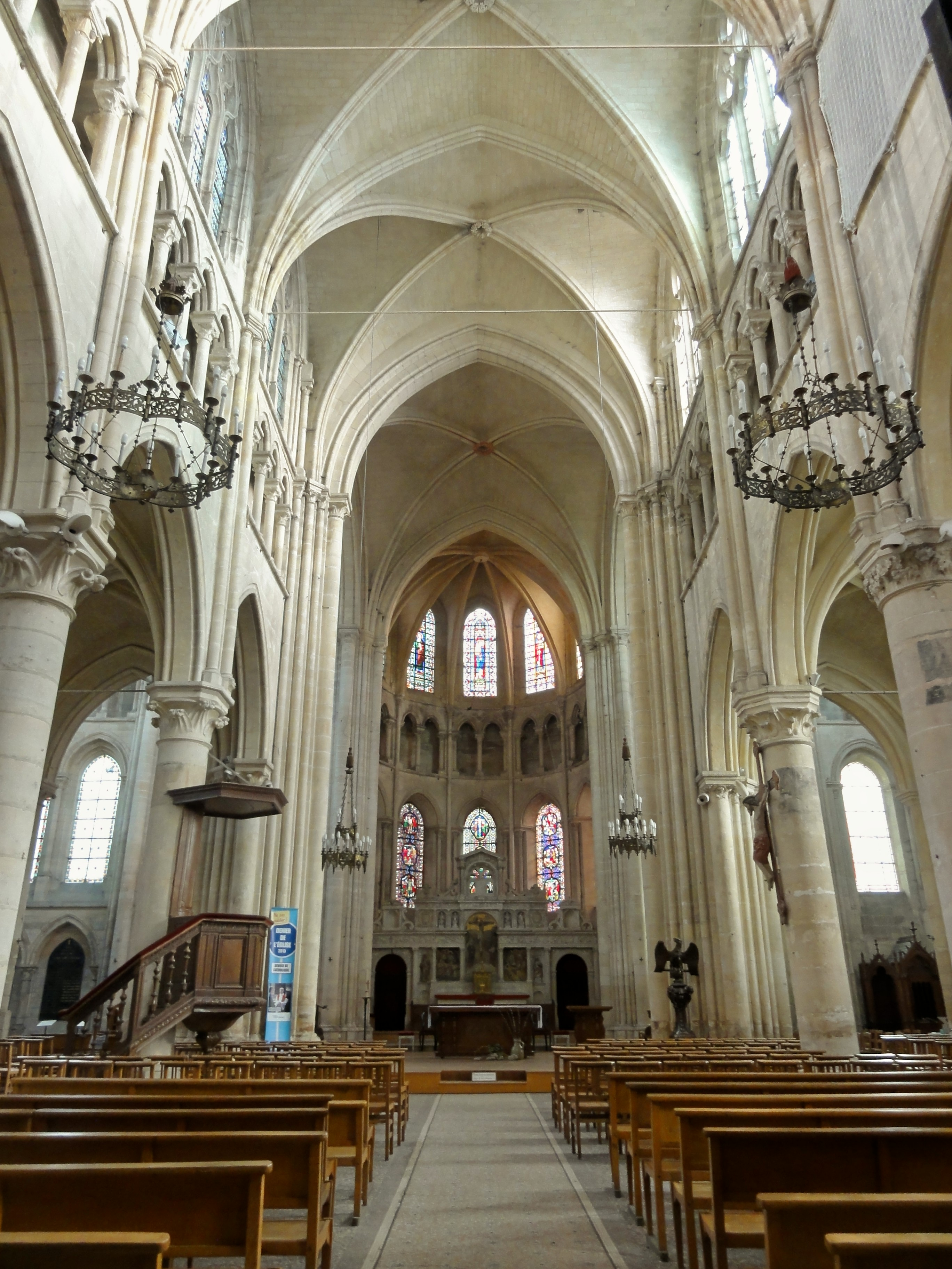 Intérieur de la nef : vue en direction de l'abside.